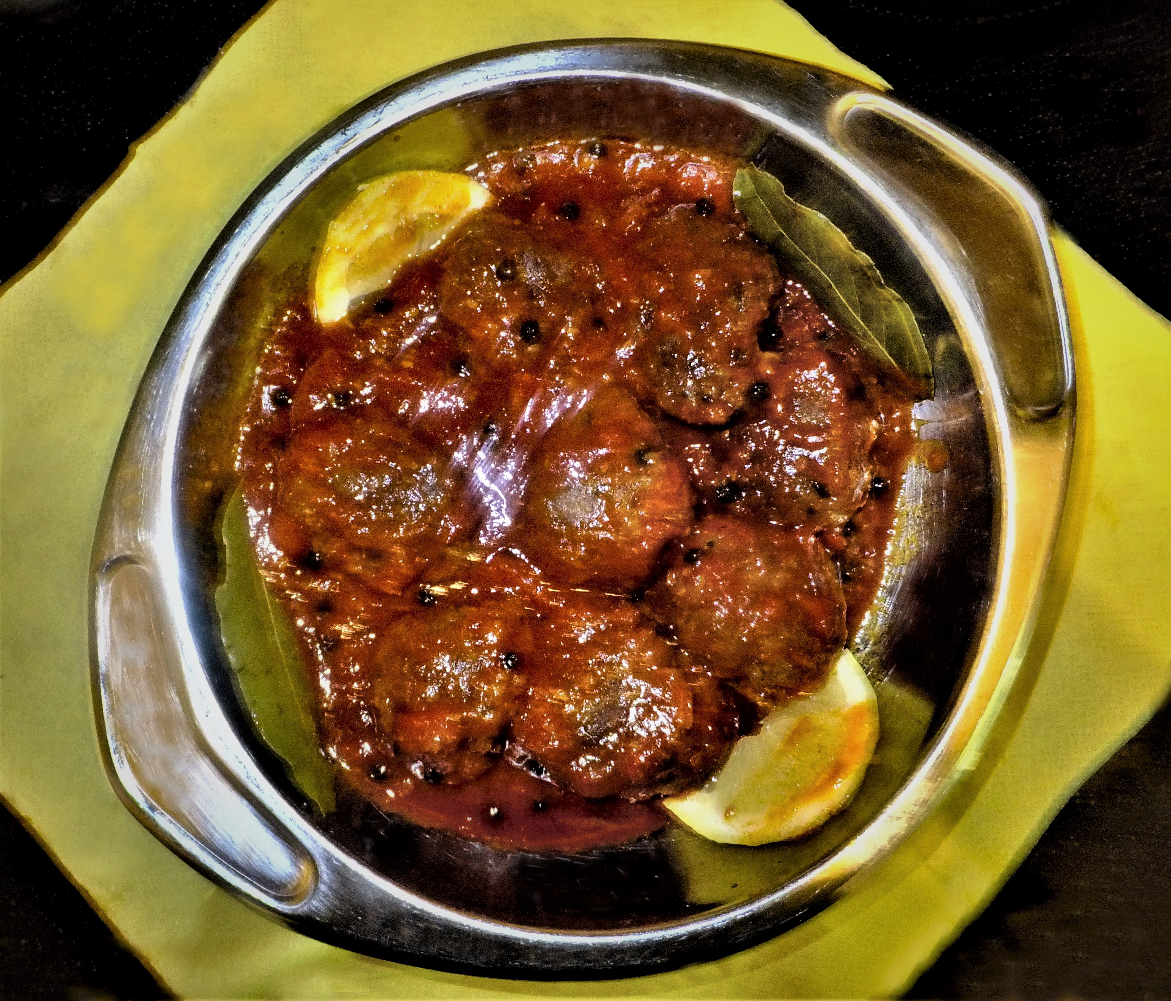 Chifteluțe marinate (Marinierte Fleischbällchen), rumänisch